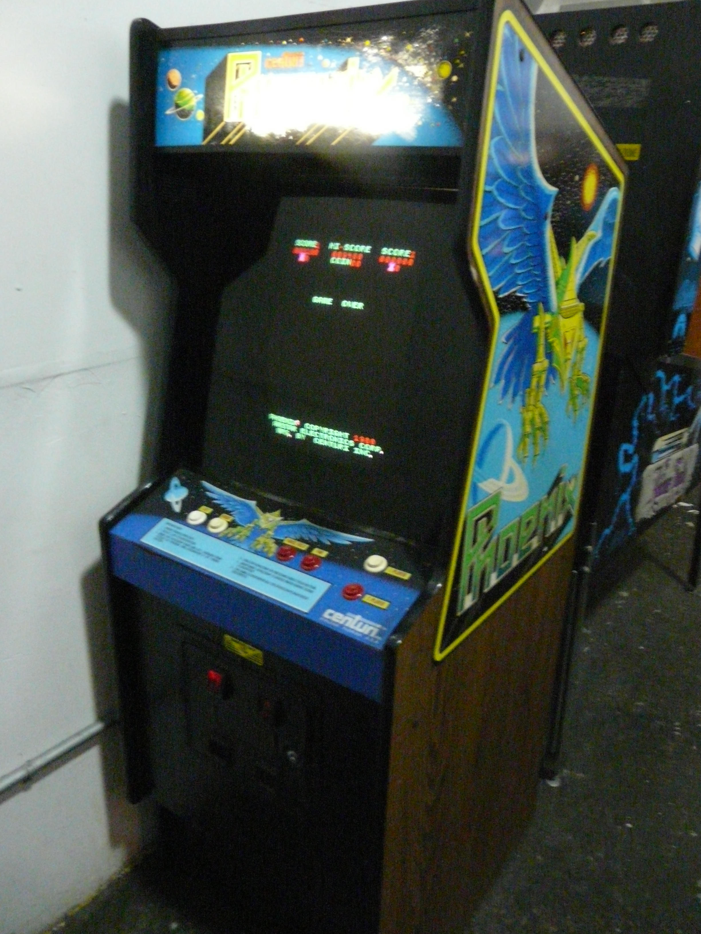 Phoenix